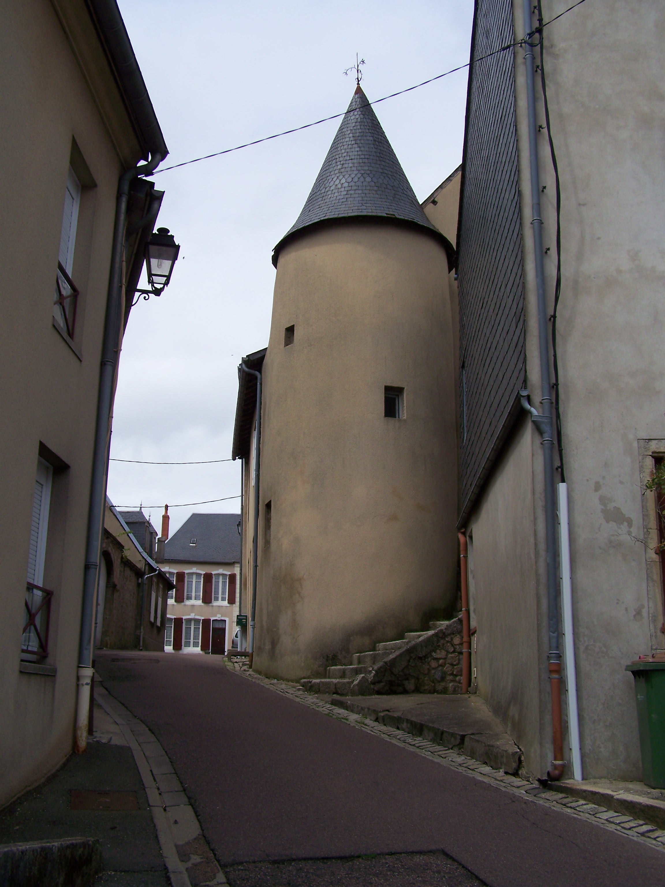 Tour de la rue de la Paix à Château-Chinon (Ville) (Nièvre, France) : vestige des anciennes fortifications de la ville.